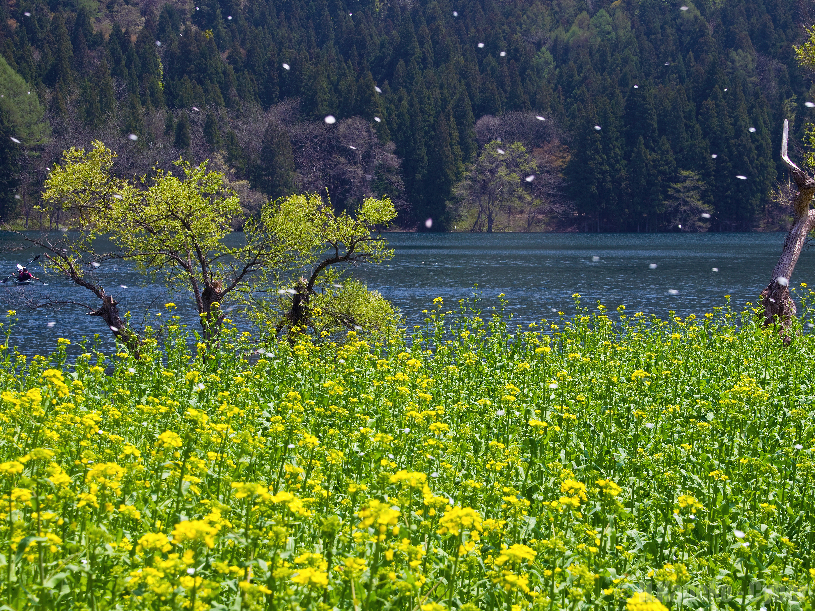 桜吹雪の湖 (Lake Hokuryu in spring) 03 May, 2014